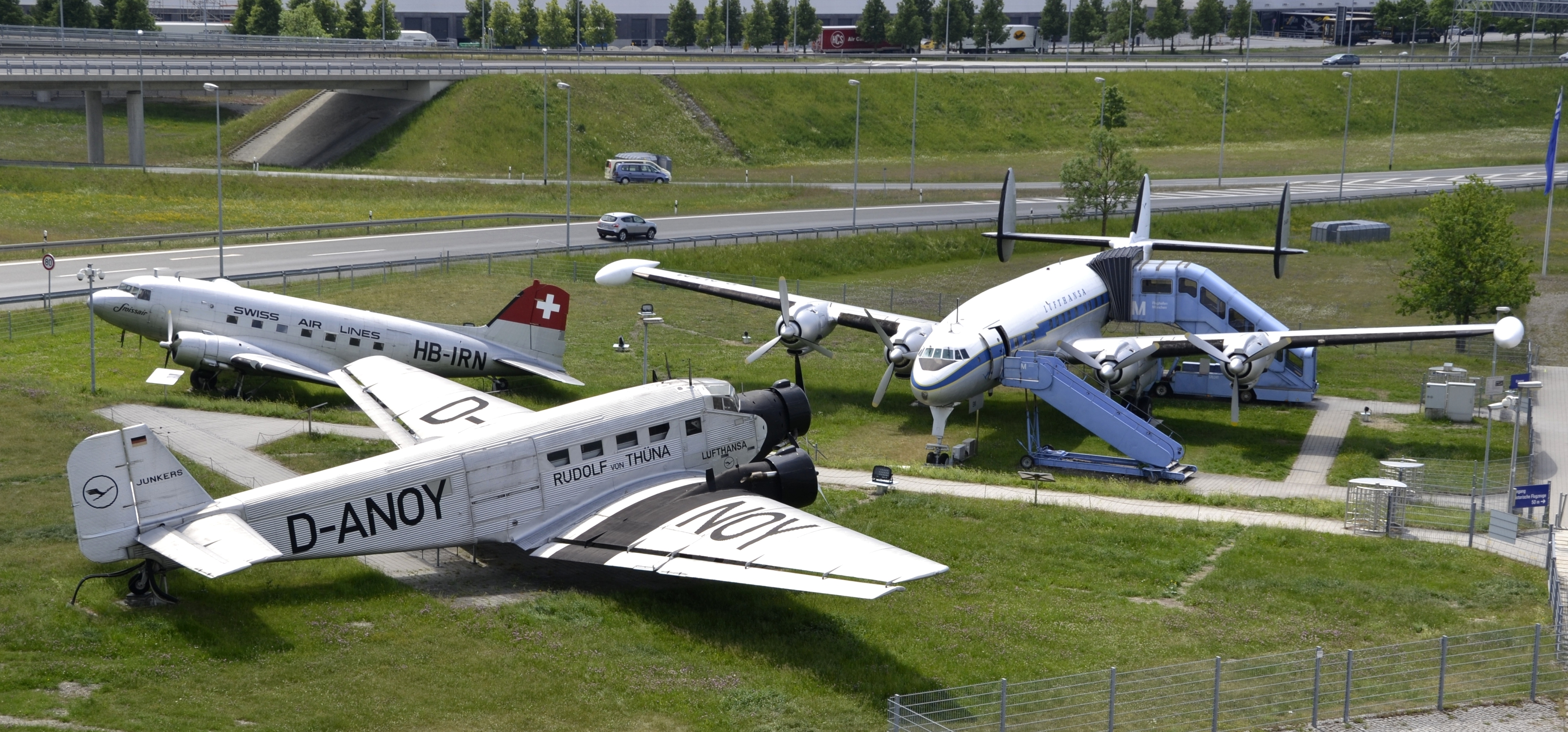 Drei ausgestellte Flugzeuge am Flughafen München Franz Josef Strauß; eine Ju 52/3m, eine DC-3 und eine Super Connie.